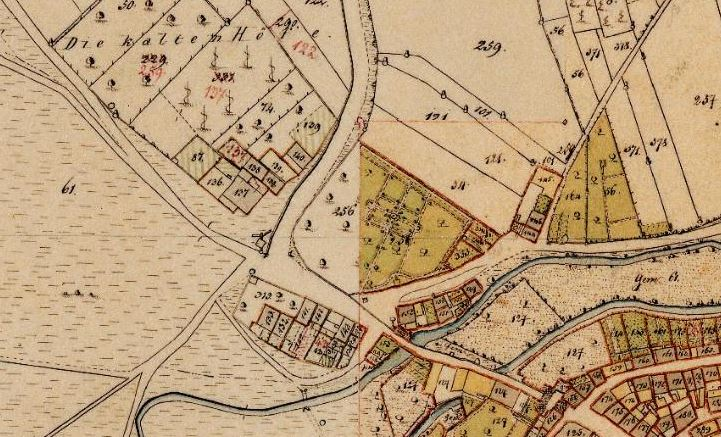 Untere Vorstadt Volkach, Aufnahme im Urkataster Bayern Anfang des 19. Jahrhunderts